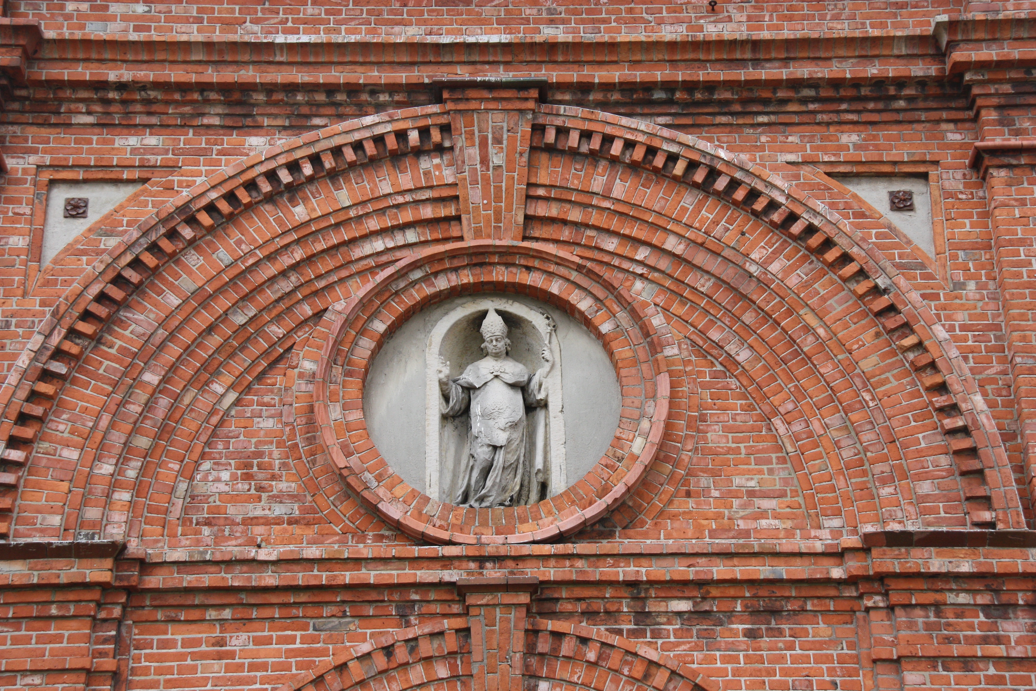 Hamburg, Billwerder, St. NIkolai-Kirche, Haupteingang, Statue St. Nikolaus über dem Haupteingang